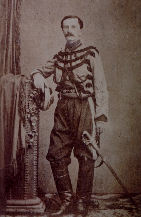 Oswald Bénigne de Montarby (1828-1865)